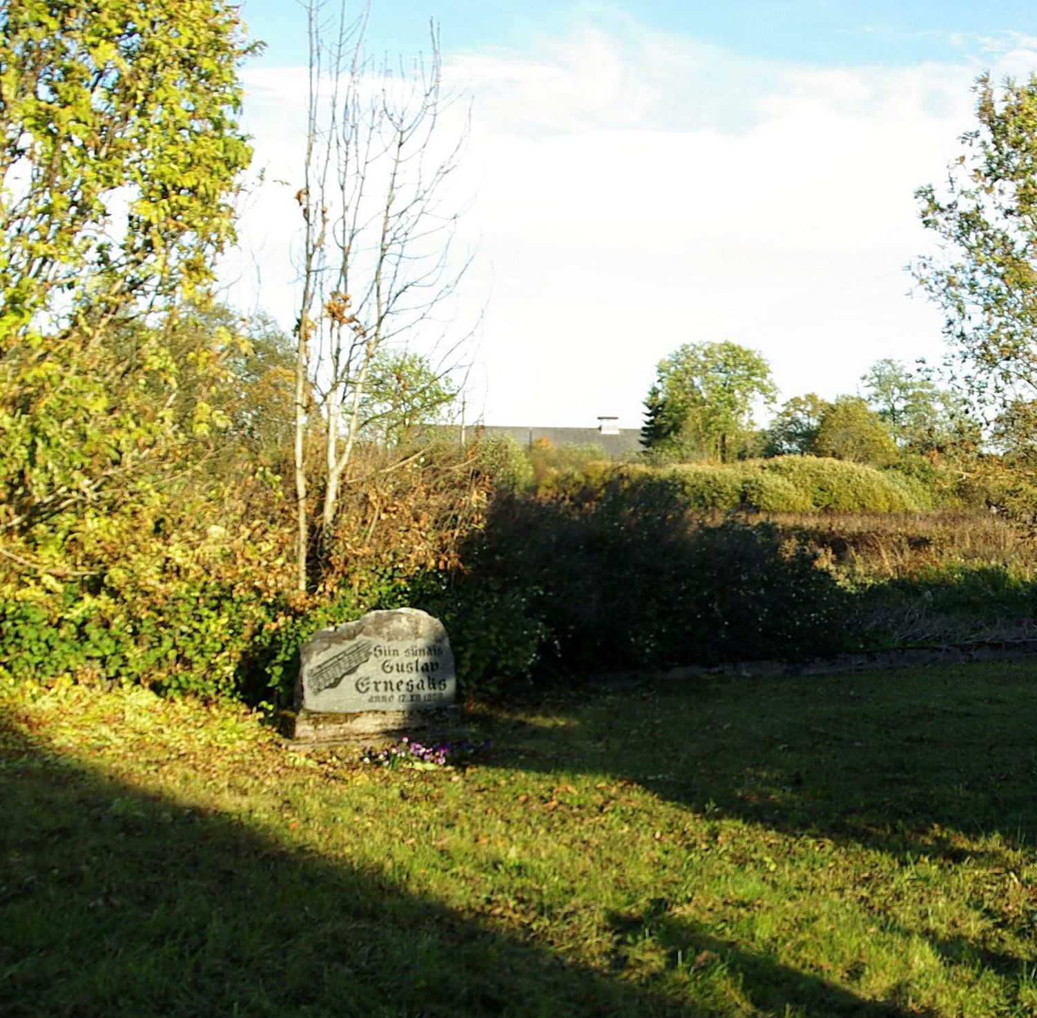 Harjumaa,Peningi vald